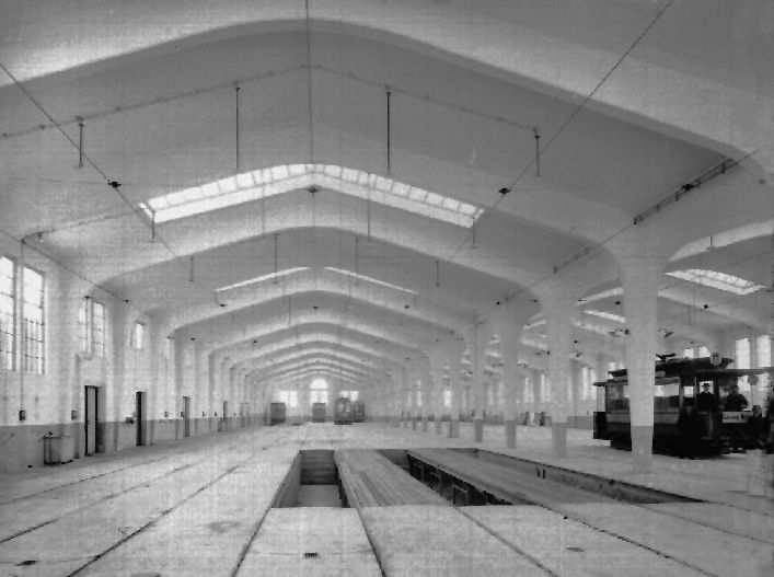 Depot Straßenbahnhof Dölitz um 1912